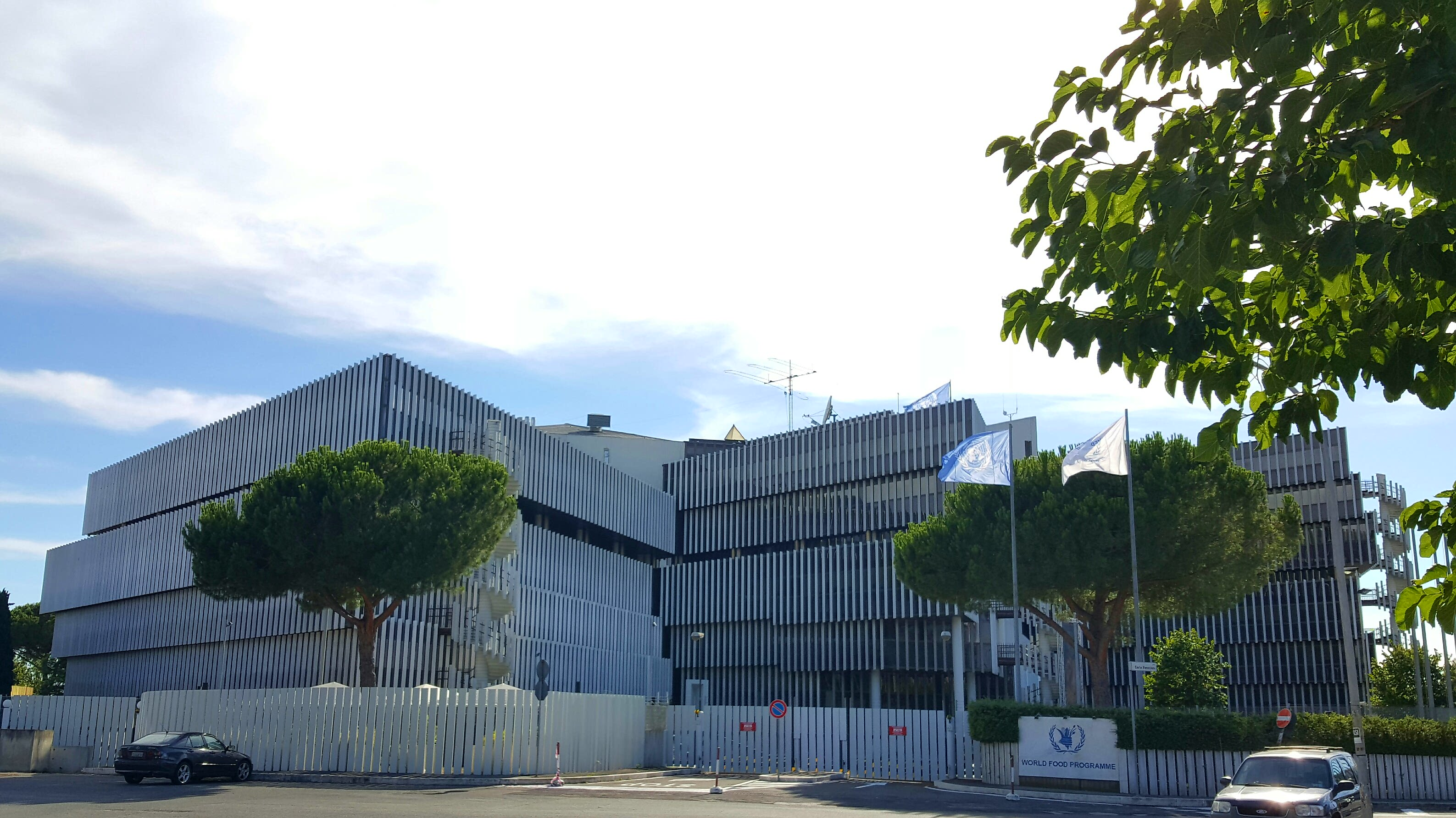 Sede del WFP a Roma, Via Cesare Giulio Viola, 68